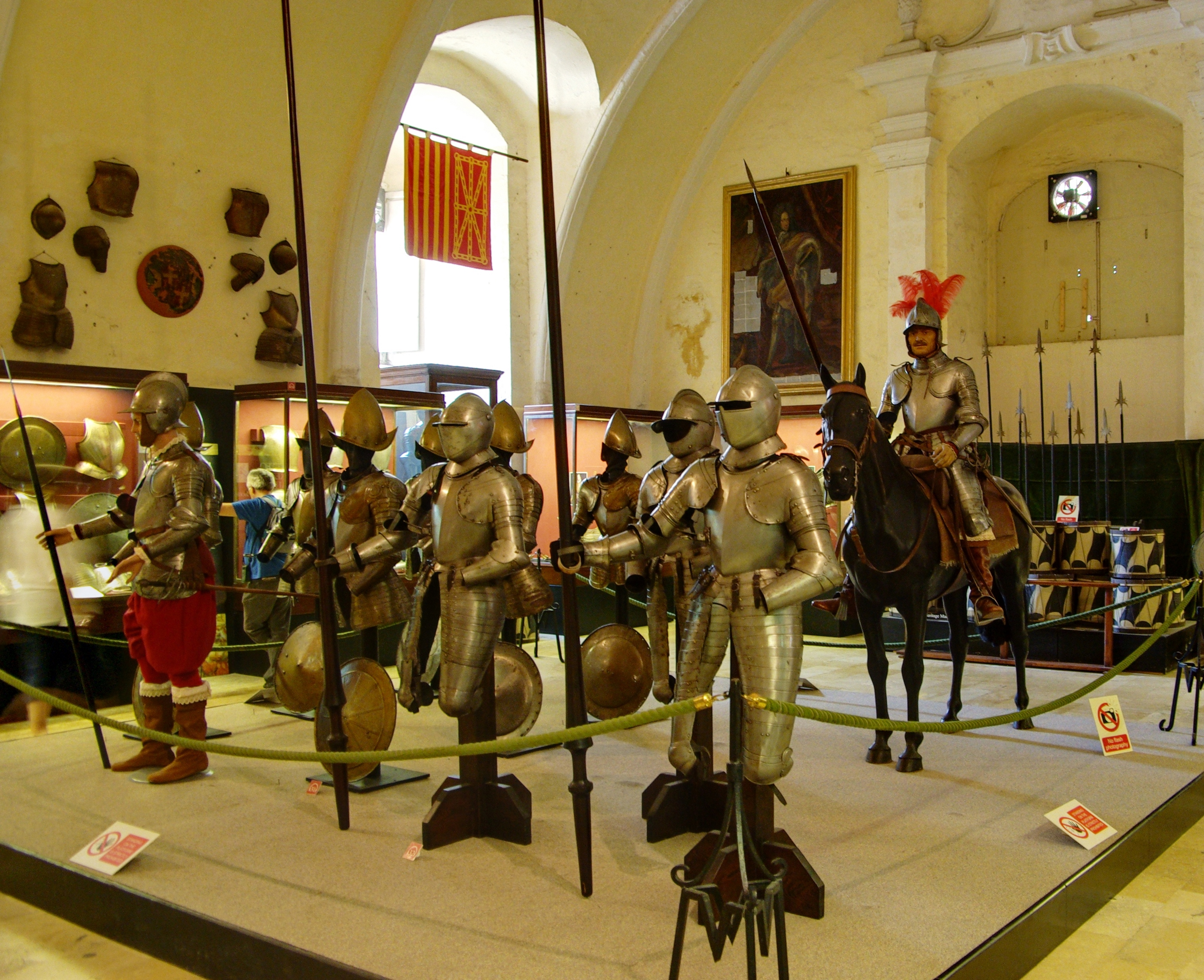 Malta, Valletta, Großmeisterpalast, Waffenkammer